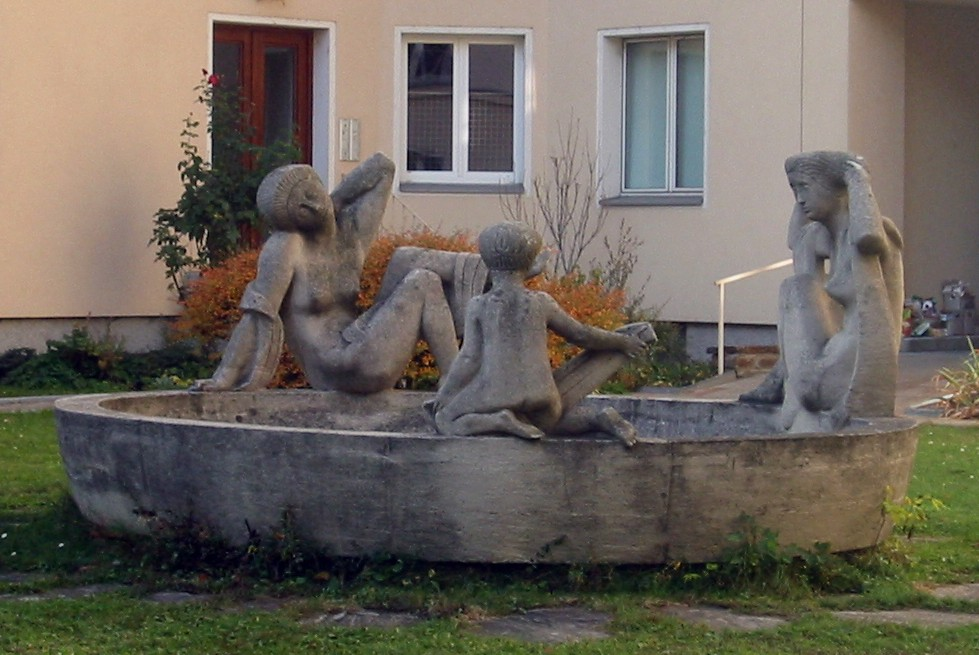 Wien, Brunnen in der Wohnanlage Kolschitzkygasse 14-18